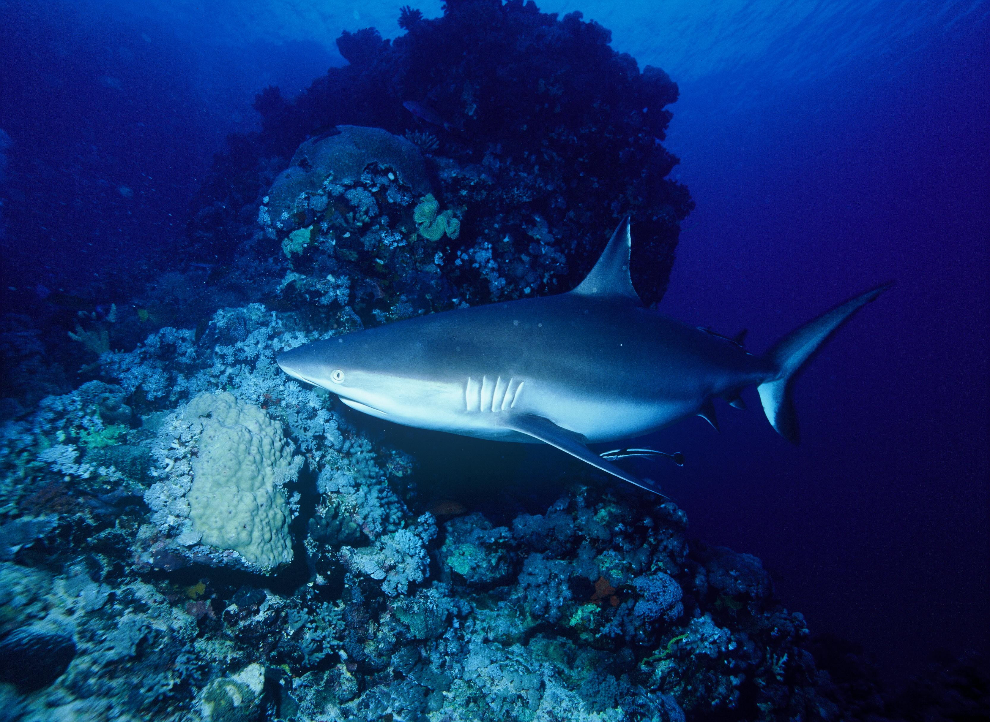 Carcharhinus amblyrhynchos